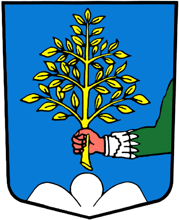 Wappen von Sembrancher Kanton Wallis Schweiz